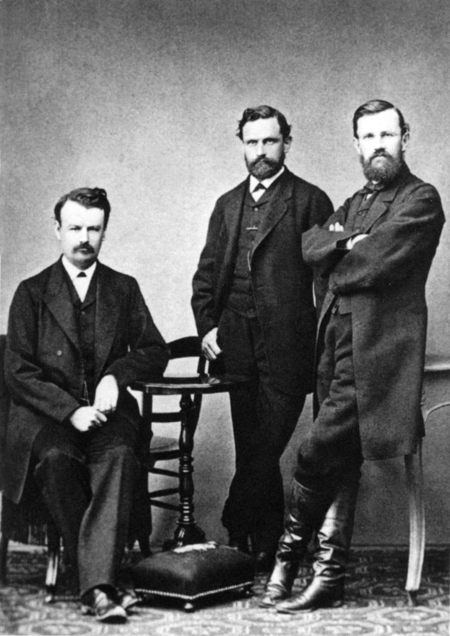 die drei Söhne von Heinrich Emanuel Merck (v.l.n.r.) Christoph Wilhelm Ludwig Merck (* 11. Oktober 1833 in Darmstadt; † 12. Januar 1899 ebenda), Chemiker Georg Franz Merck (* 20. Januar 1825 in Darmstadt; † 18. März 1873), Apotheker Carl Wilhelm Merck (* 6. Dezember 1823 in Darmstadt; † 1. März 1885 ebd.), Drogist